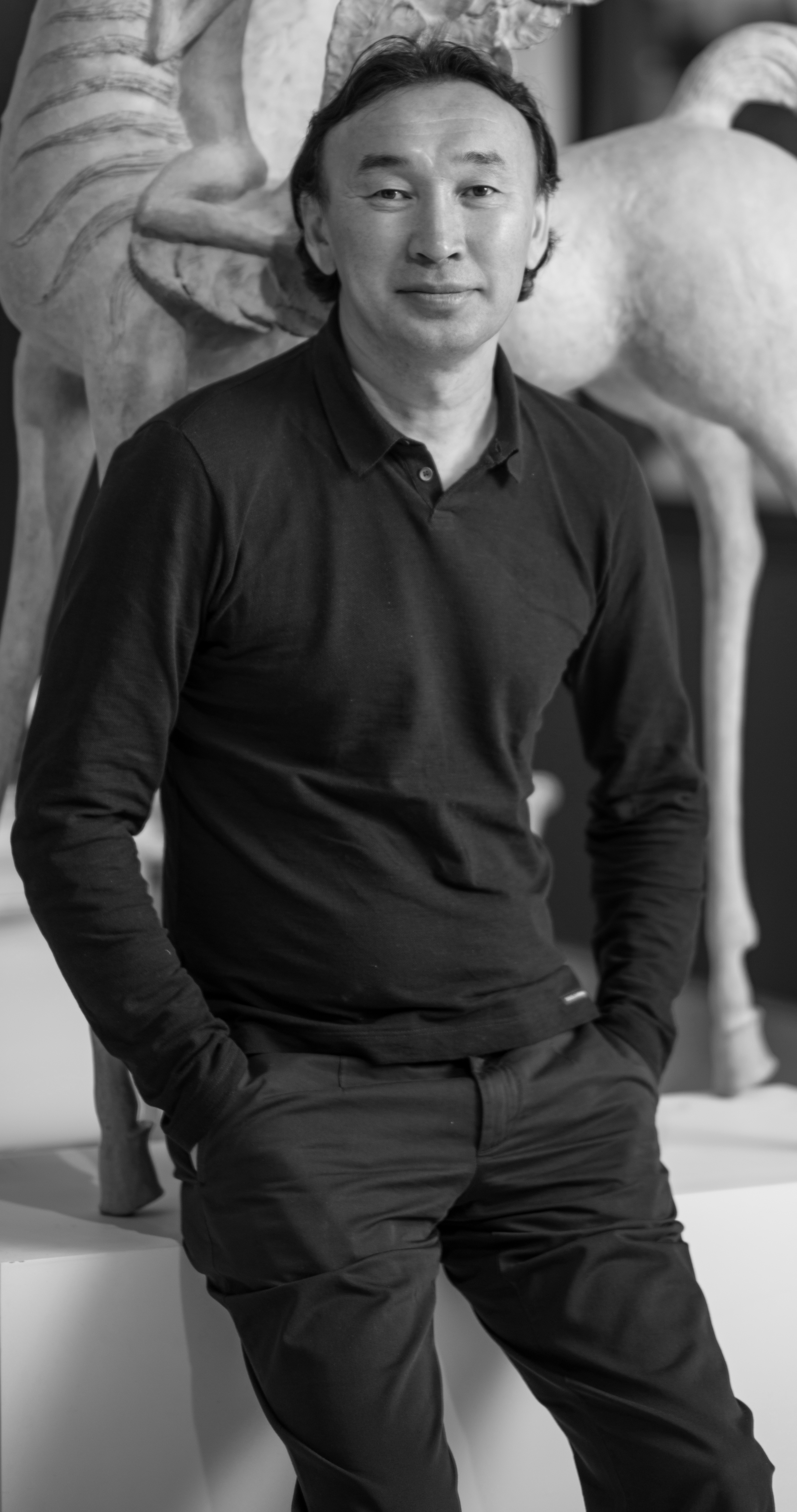 Фото Даши Намдакова